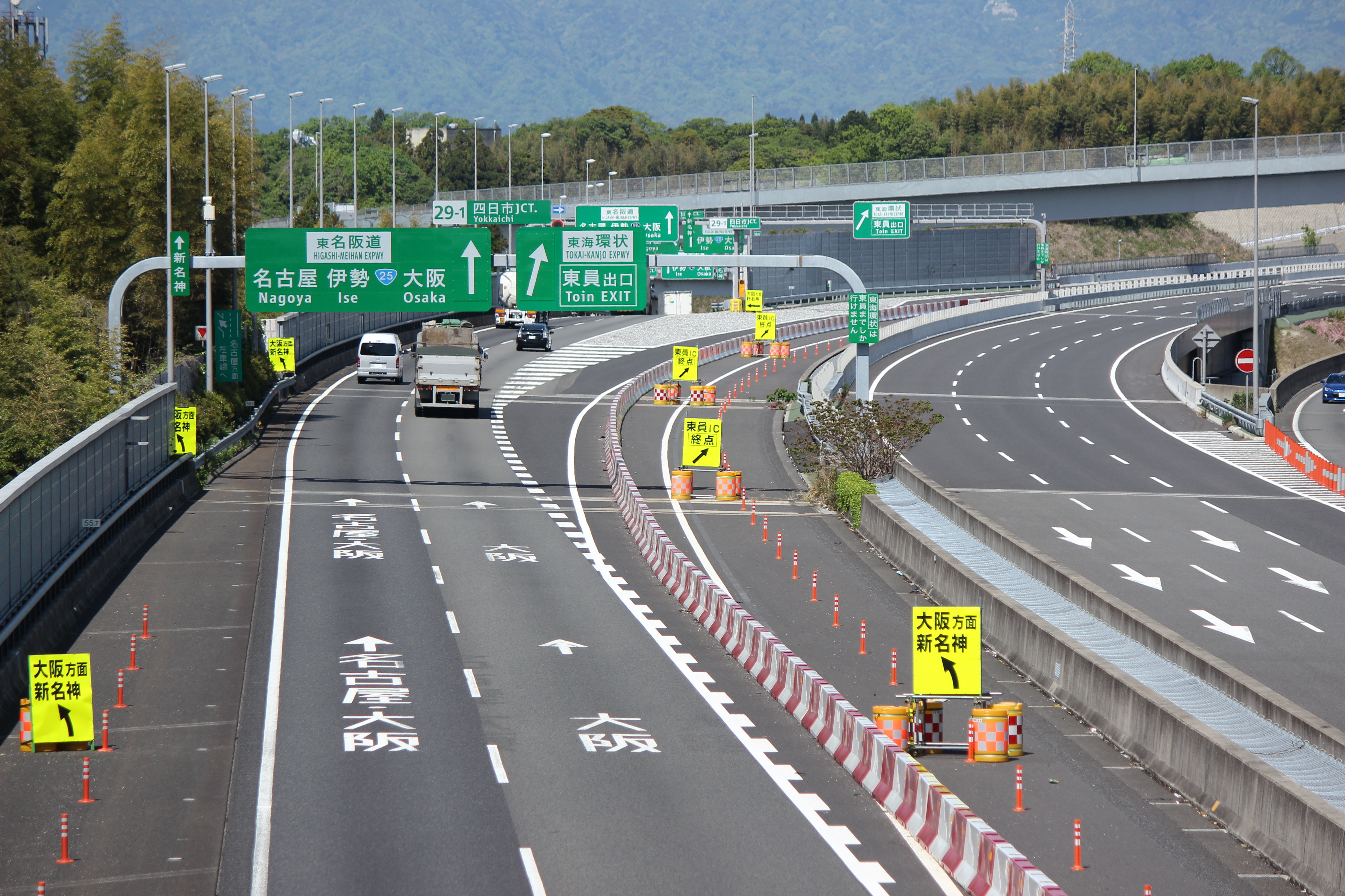 四肢化直後の四日市JCT。東海環状道と新名神を合わせて東員ICまでの連絡であった。